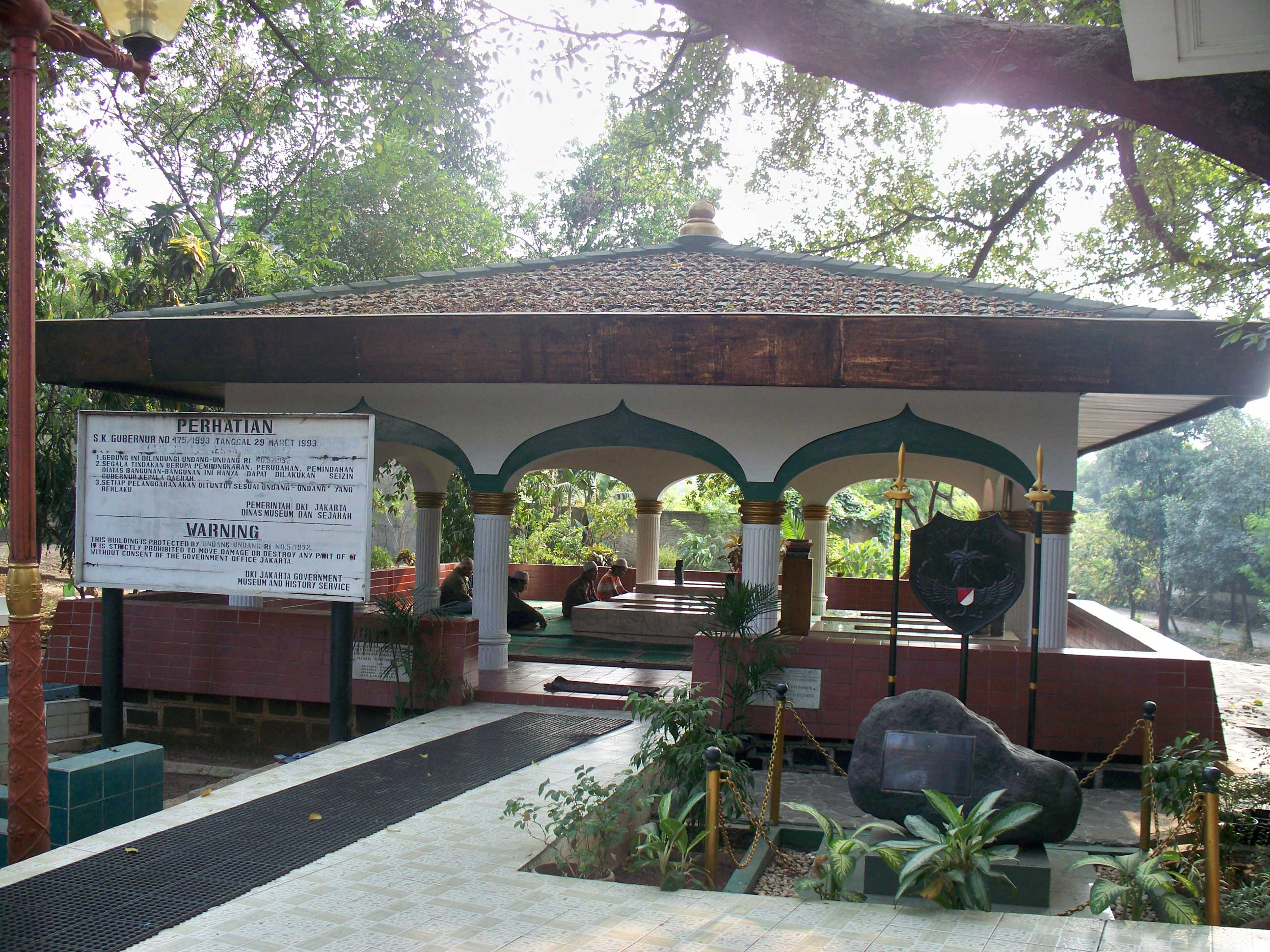 Makam Pangeran Jayakarta